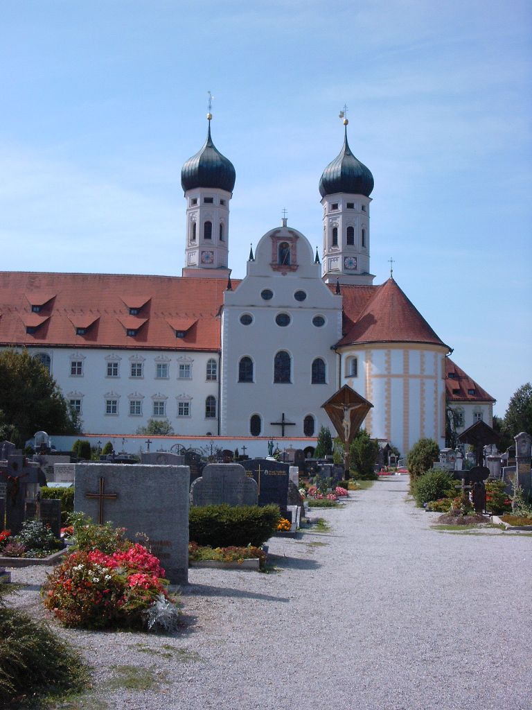 Kloster Benediktbeuern